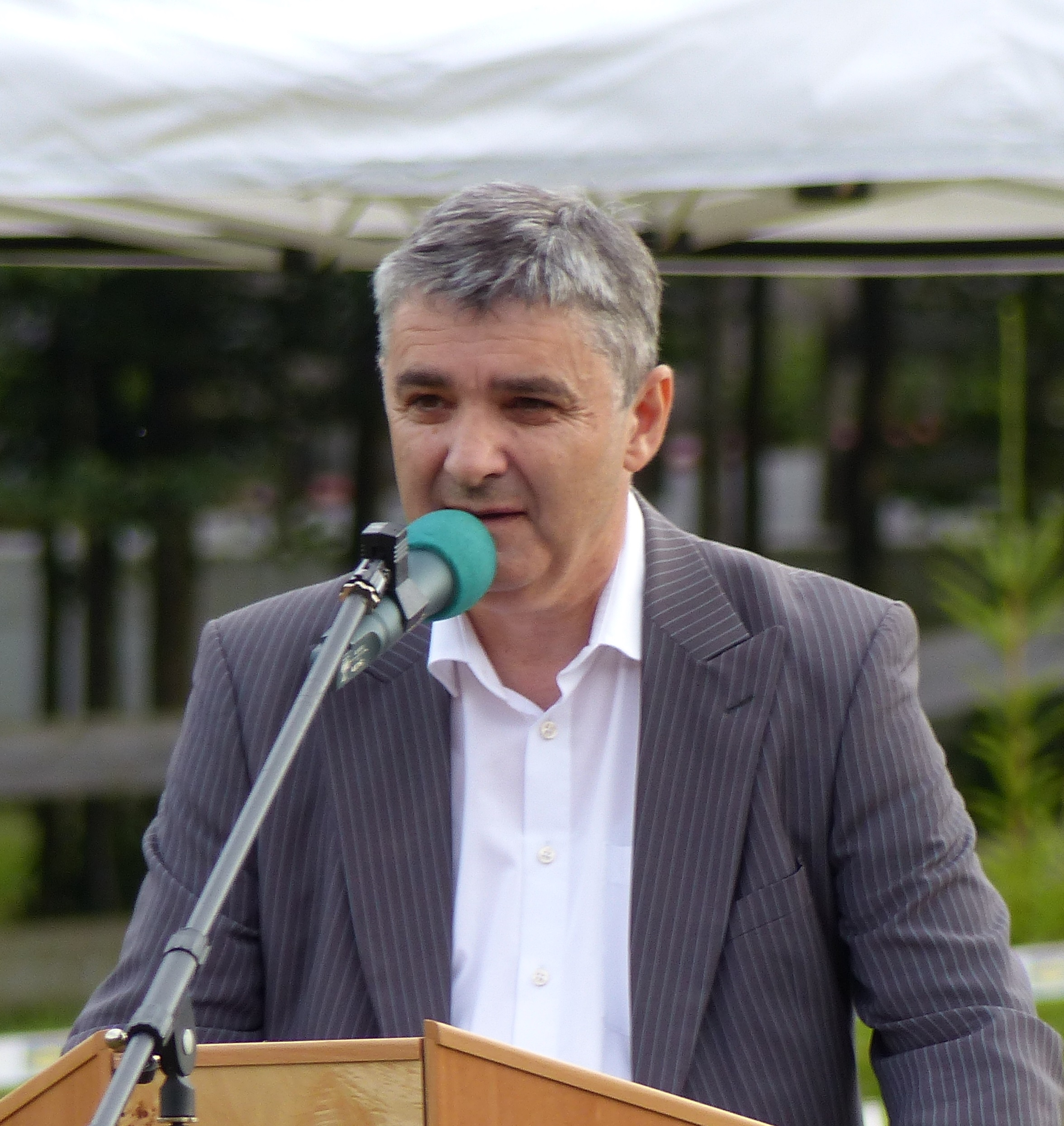 Walter Temmel bei einer Ansprache in Kleinmürbisch